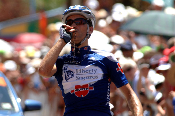 Afbeelding van Carlos Barredo Llamazales.